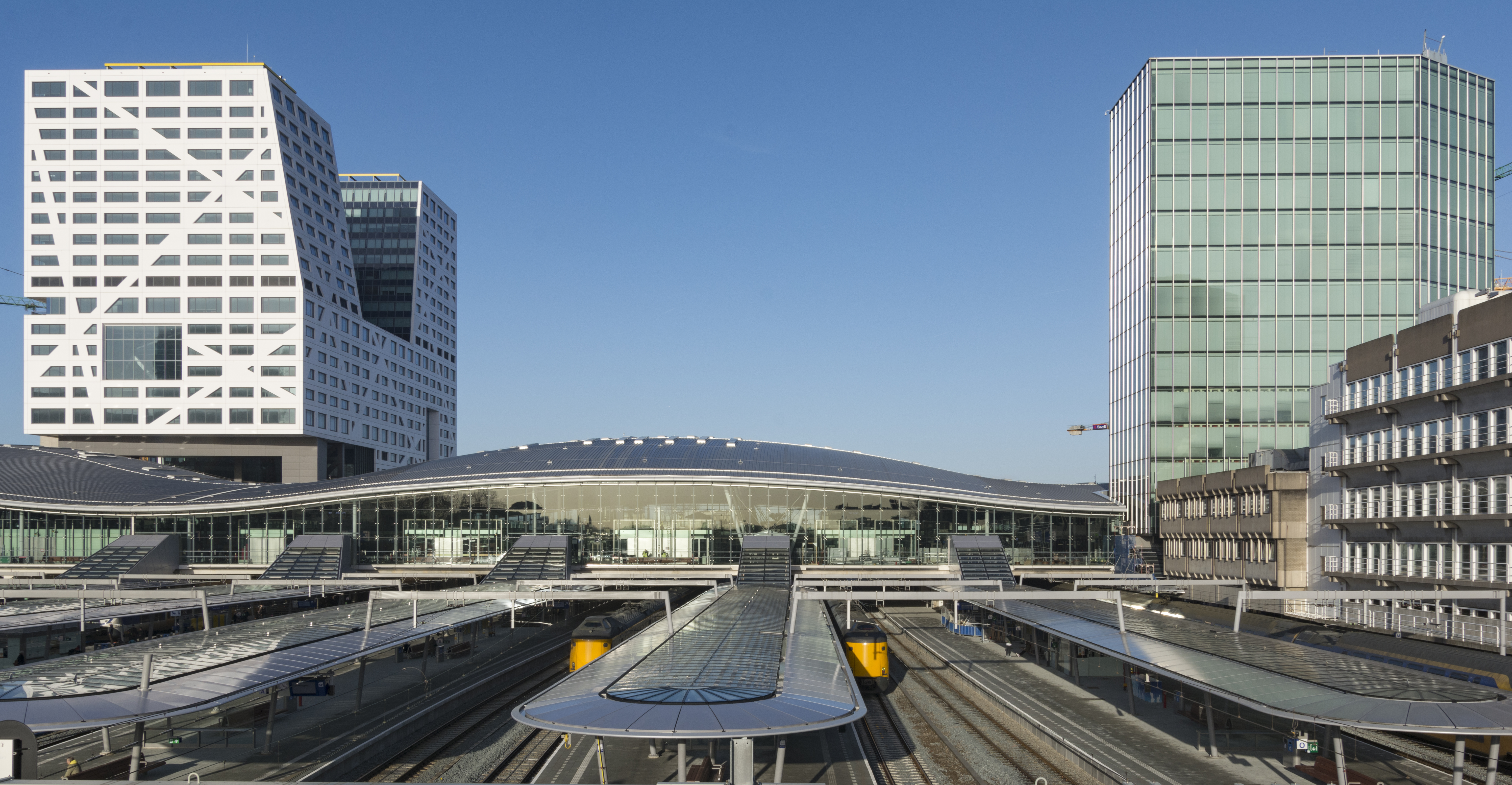 Station Utrecht Centraal werd op 6 december 2016 officieel geopend. Hier het overzicht op de stationshal vanaf de zuidzijde van de Moreelsebrug. Deze foto van mij is gebruikt bij een recensie van het nieuwe boek van de Duitse schrijver Martin Walser. Daarin beschrijft hij een - waarschijnlijk fictieve - ontmoeting met Jean Paul Sartre op het station van Utrecht. Kijk hier